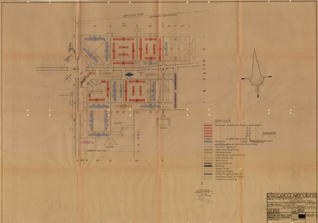 Op 15 augustus 1939 gaf burgemeester E. Derks Hzn. toestemming voor de bouw van een barakkenkamp "op het perceel, kadastraal bekend gemeente Westerbork, sectie A no. 2459 gelegen in het Zwiggelterveld onder Zwiggelte aan een harden weg en een zandweg aldaar".